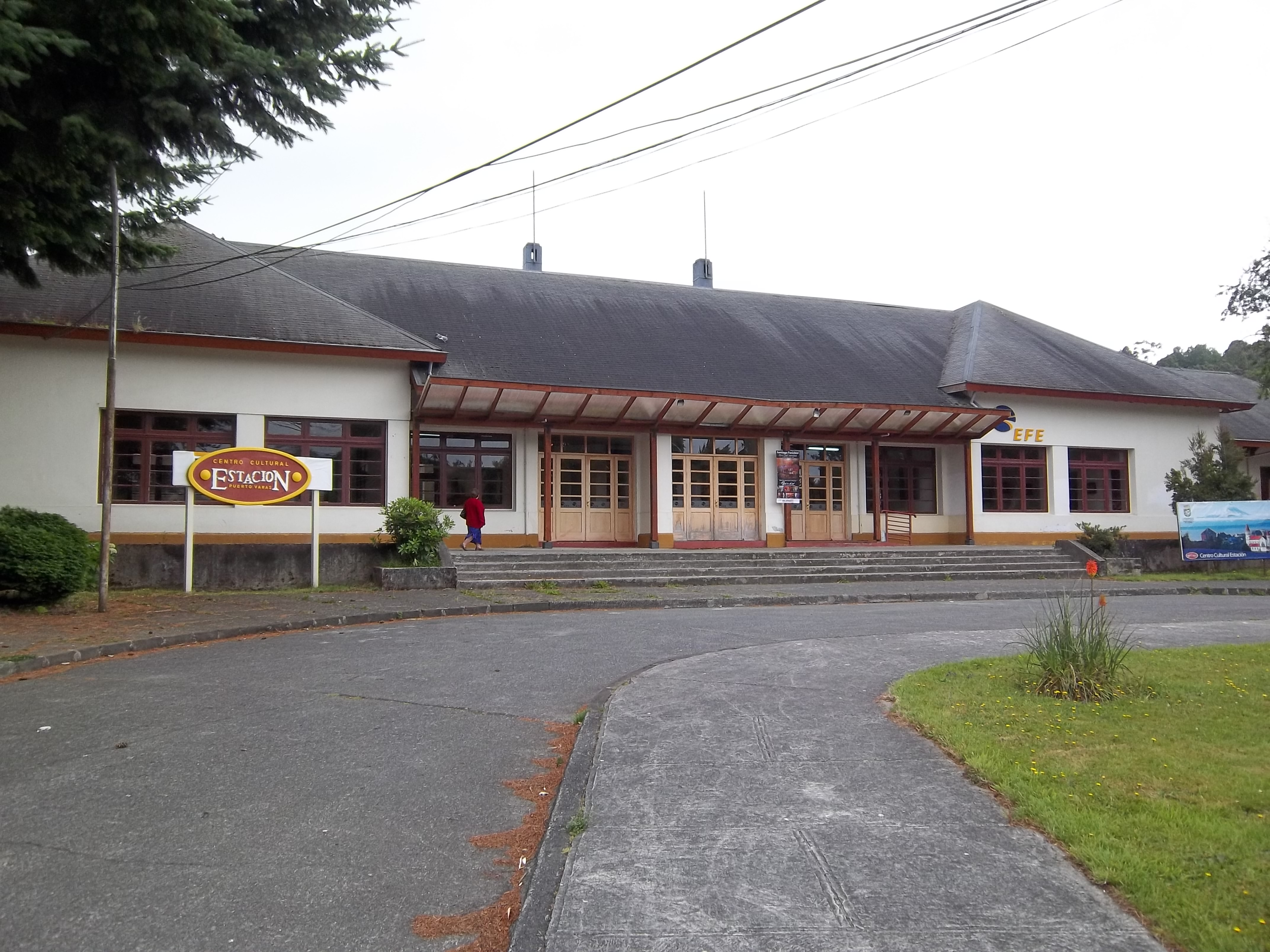 Frente del edificio de la estación ferroviaria Puerto Varas en la X Región, Chile.